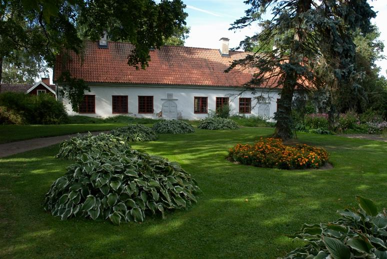 Lilla stenhuset, troligen byggt som bostadshus, även kallad Kavaljersflygeln. Byggnadsår 1651-52. Används inte idag. Motiv: Tuna kungsgård Nyckelord: Byggnadsminnen:Statl Kategori: Bostadshus, Kungsgård/kungsladugård Lilla stenhuset, troligen byggt som bostadshus, även kallad Kavaljersflygeln. Byggnadsår 1651-52. Används inte idag.